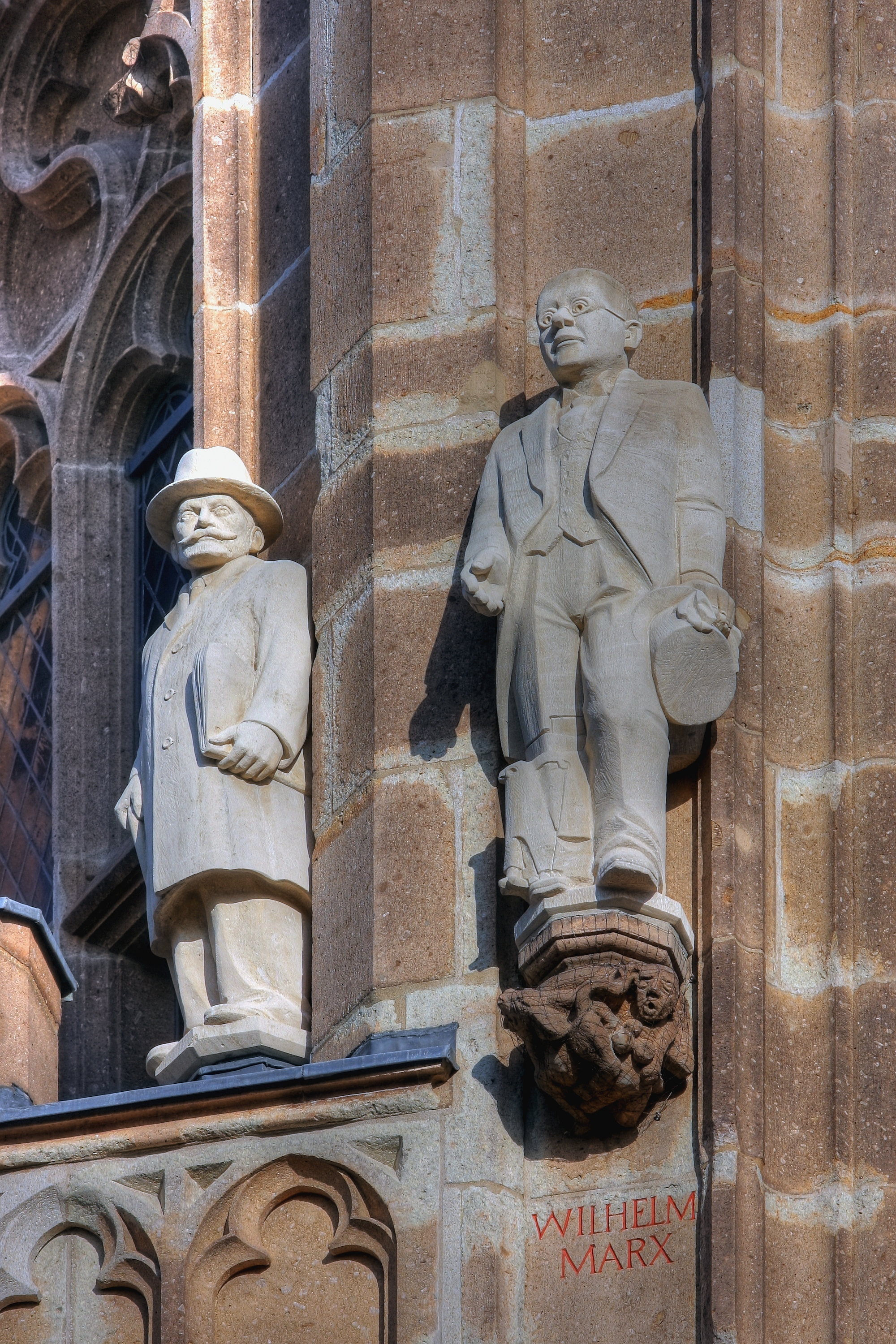 Rathausturm Köln mit der Figur des Wilhelm Marx. Figur links im Hintergrund: Max Isidor Bodenheimer